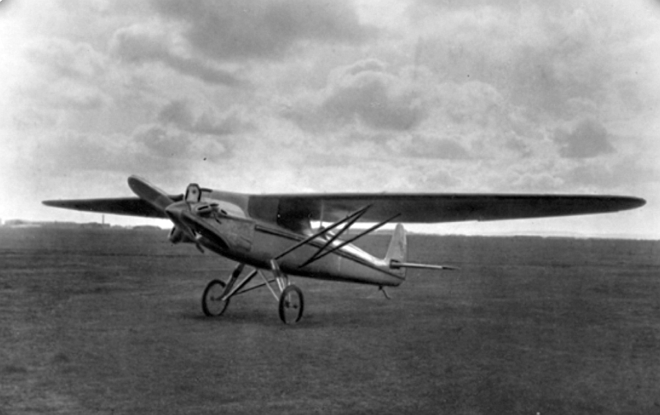 Koroljov SK-4 (1930)